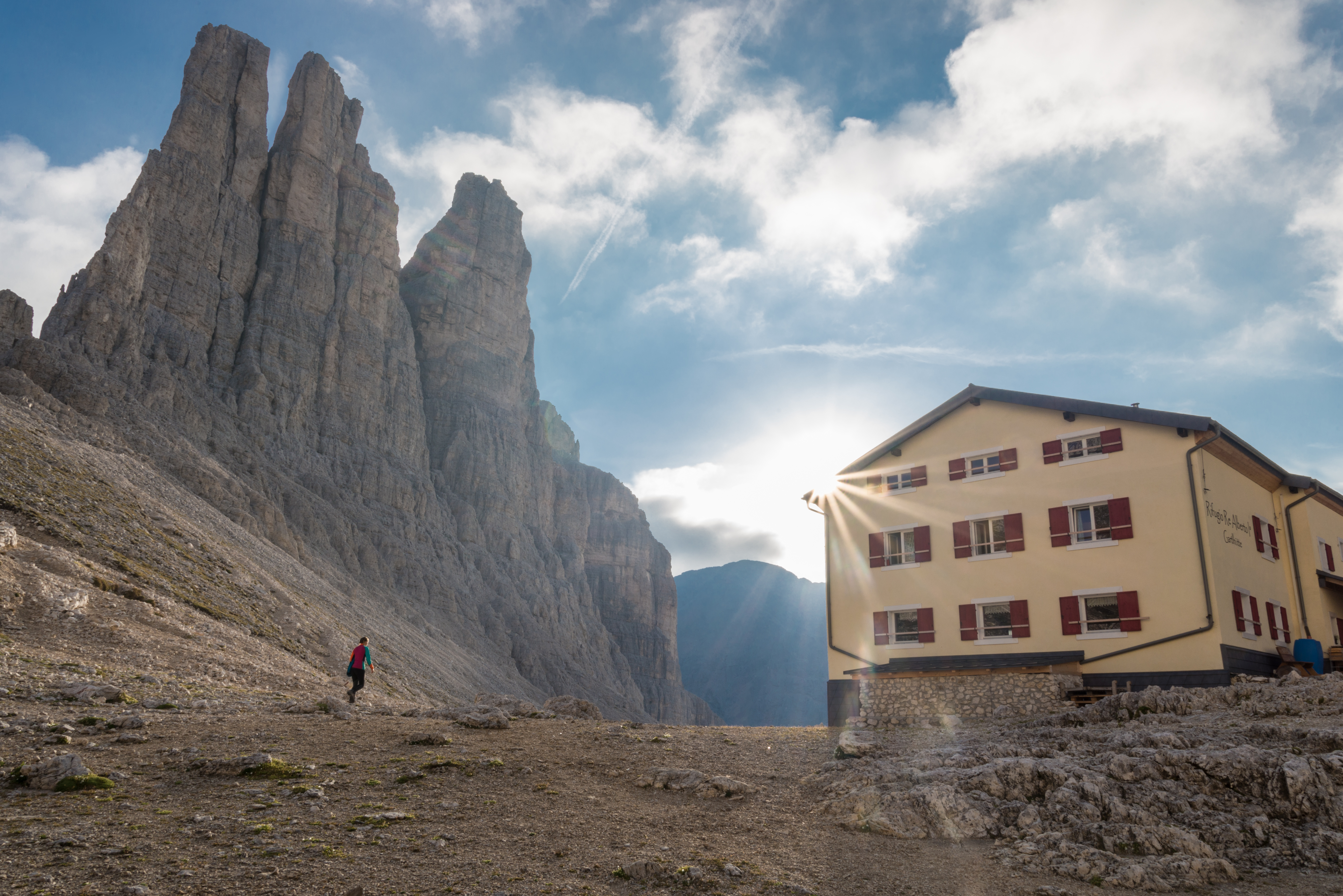 Parco naturale dello Sciliar-Catinaccio, rifugio Re, Torri del Vajolet